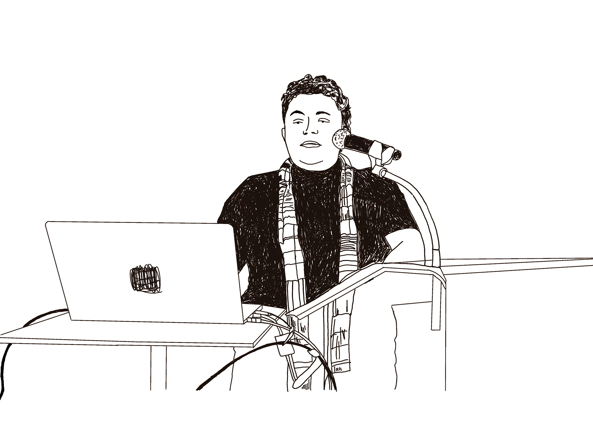 Kunstvermittlung nach der Institutionskritik - Ein Vortrag von Carmen Mörsch (ZHdK)